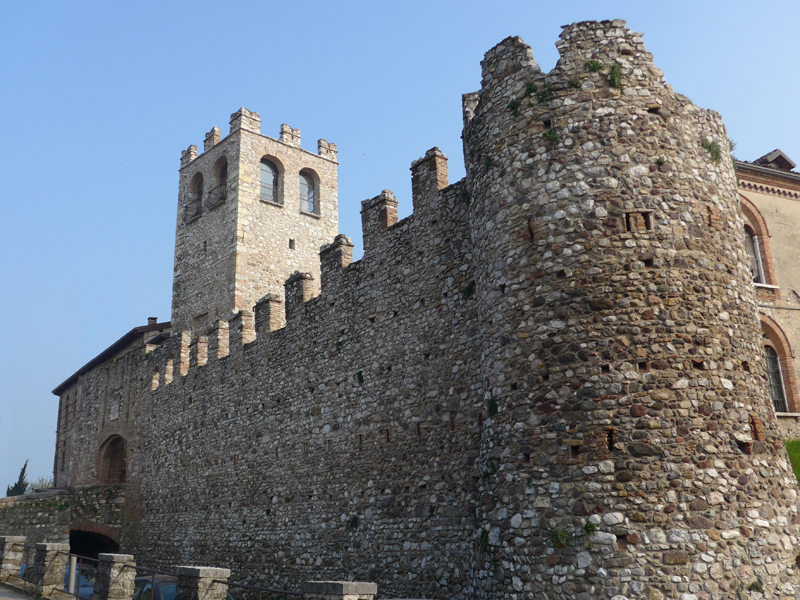 Desenzano del Garda, il castello.